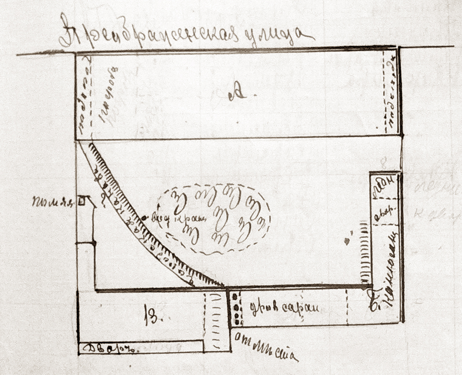 План сядзібы Дома Суціна. Бачна як працякае ручай – пазначаны як Гарадская канава. План пачатку ХХ стагоддзя